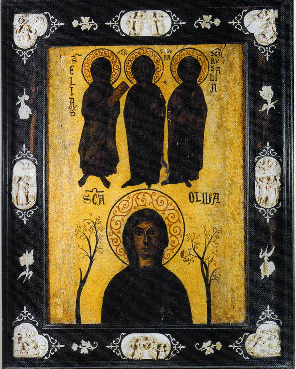 Icona del secolo XIII con S. Olivia, inoltre S. Elia, S. Venera e S. Rosalia. Museo Diocesano, Palermo